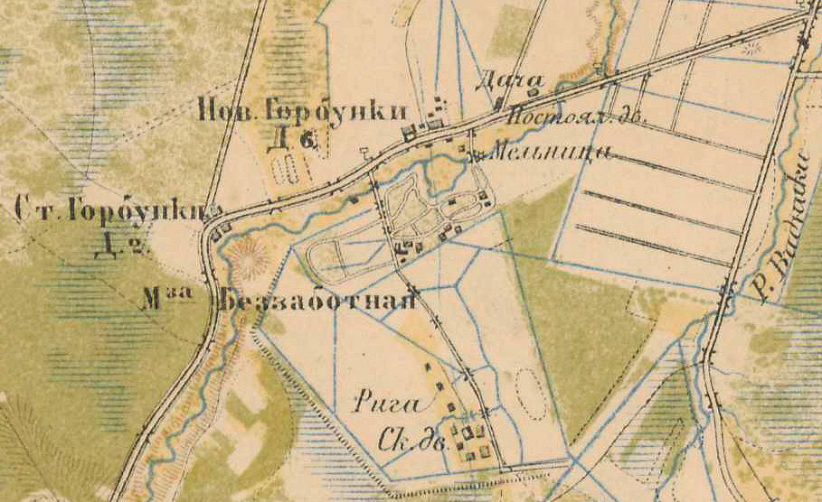 Деревня Горбунки на карте 1885 года.